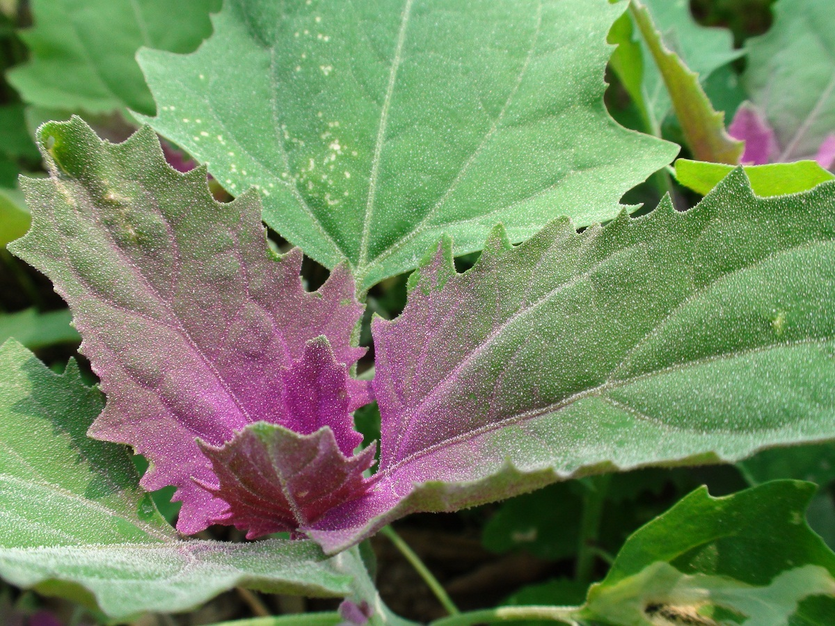 नेपाली: बेथुको कलिलो मुना